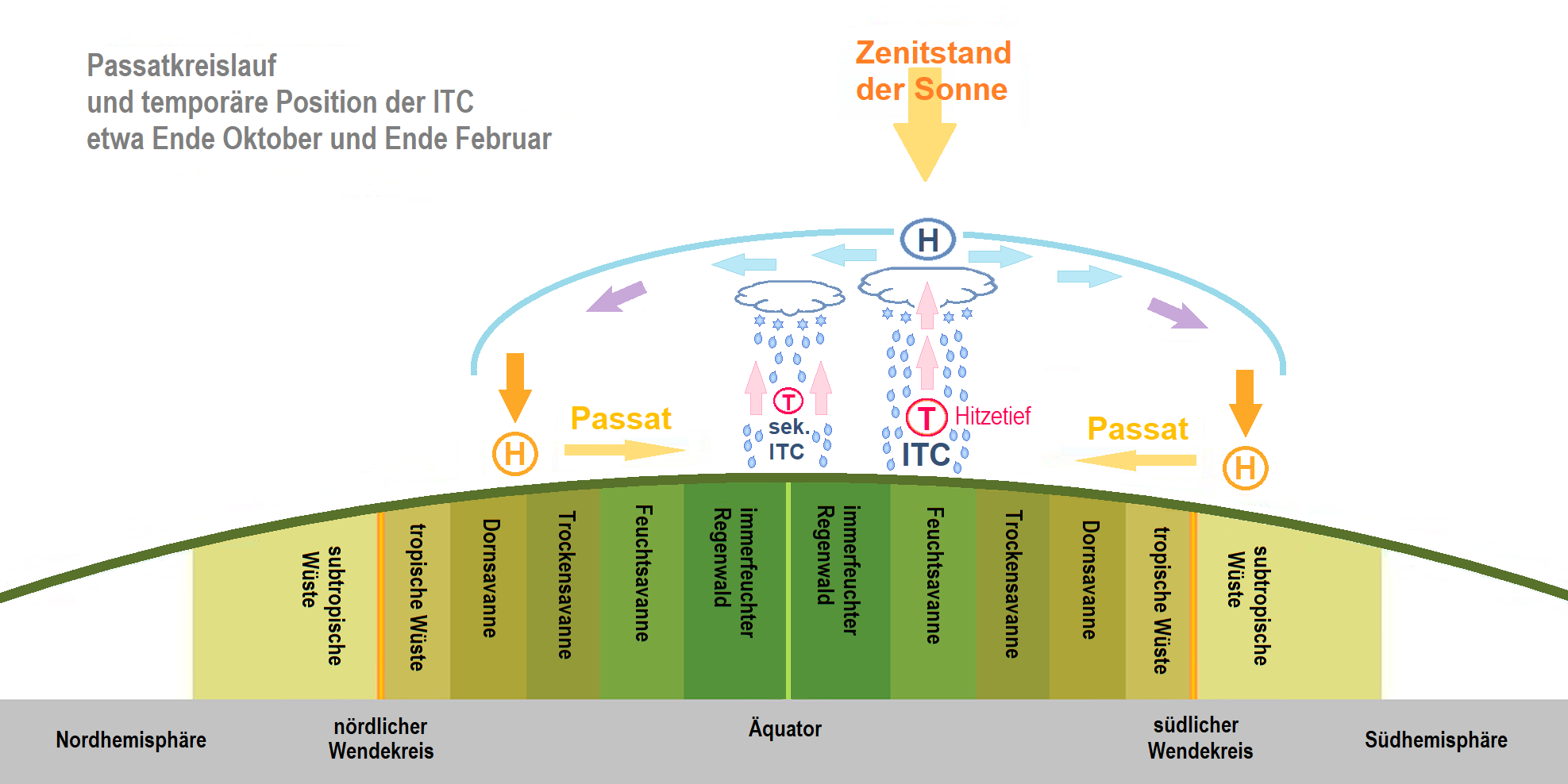 ITC und Passatkreislauf